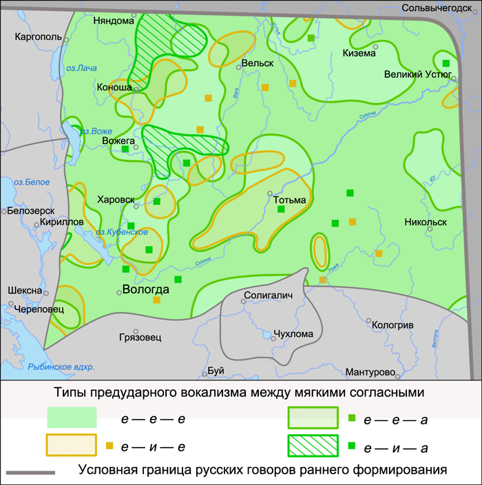 Карта распространения типов предударного вокализма между мягкими согласными в вологодских говорах. Источники: Захарова К. Ф., Орлова В. Г., Сологуб А. И., Строганова Т. Ю. Образование севернорусского наречия и среднерусских говоров / Ответственный редактор В. Г. Орлова. — М.: «Наука», 1970. — С. 262 (Карта 72. Типы предударного вокализма между мягкими согласными)